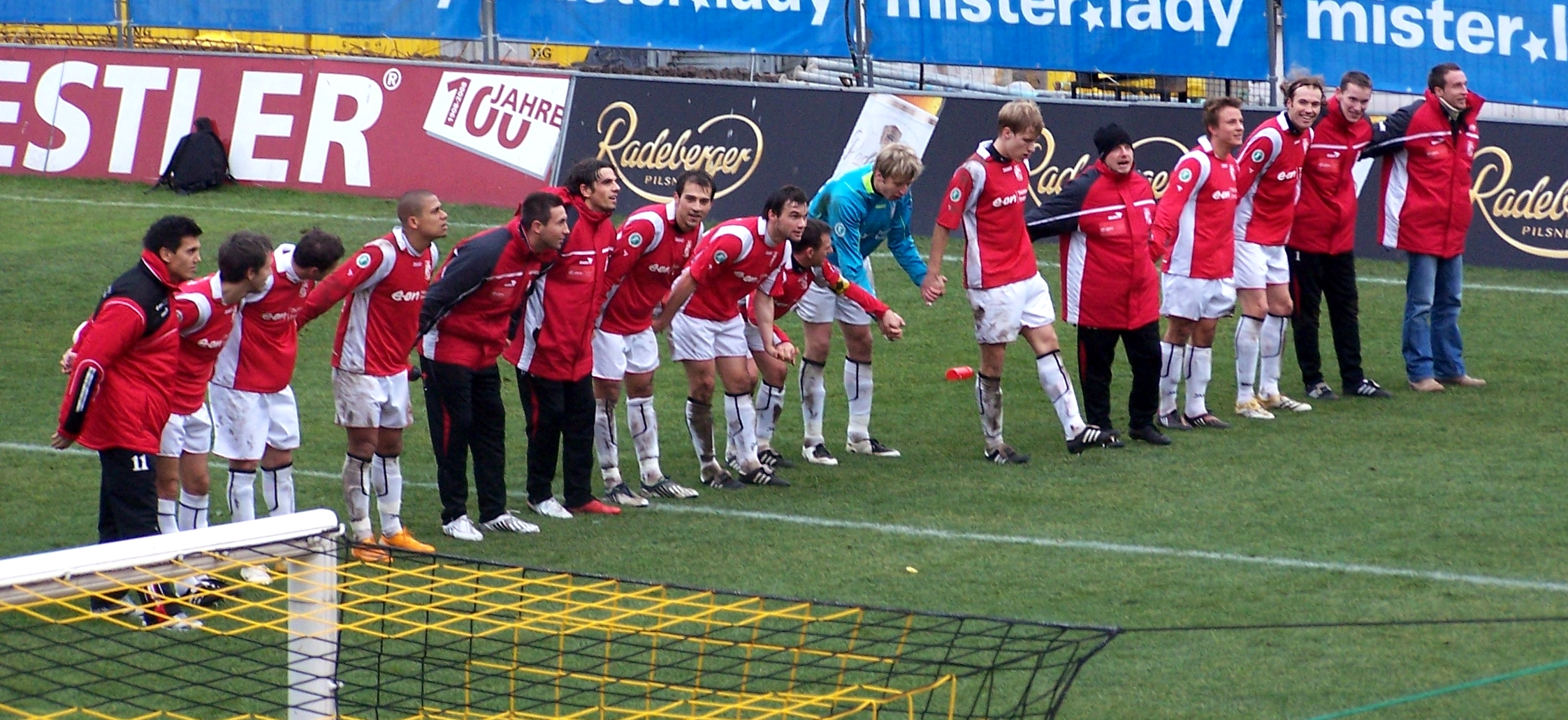 Die Erfurter verabschieden sich in die Winterpause